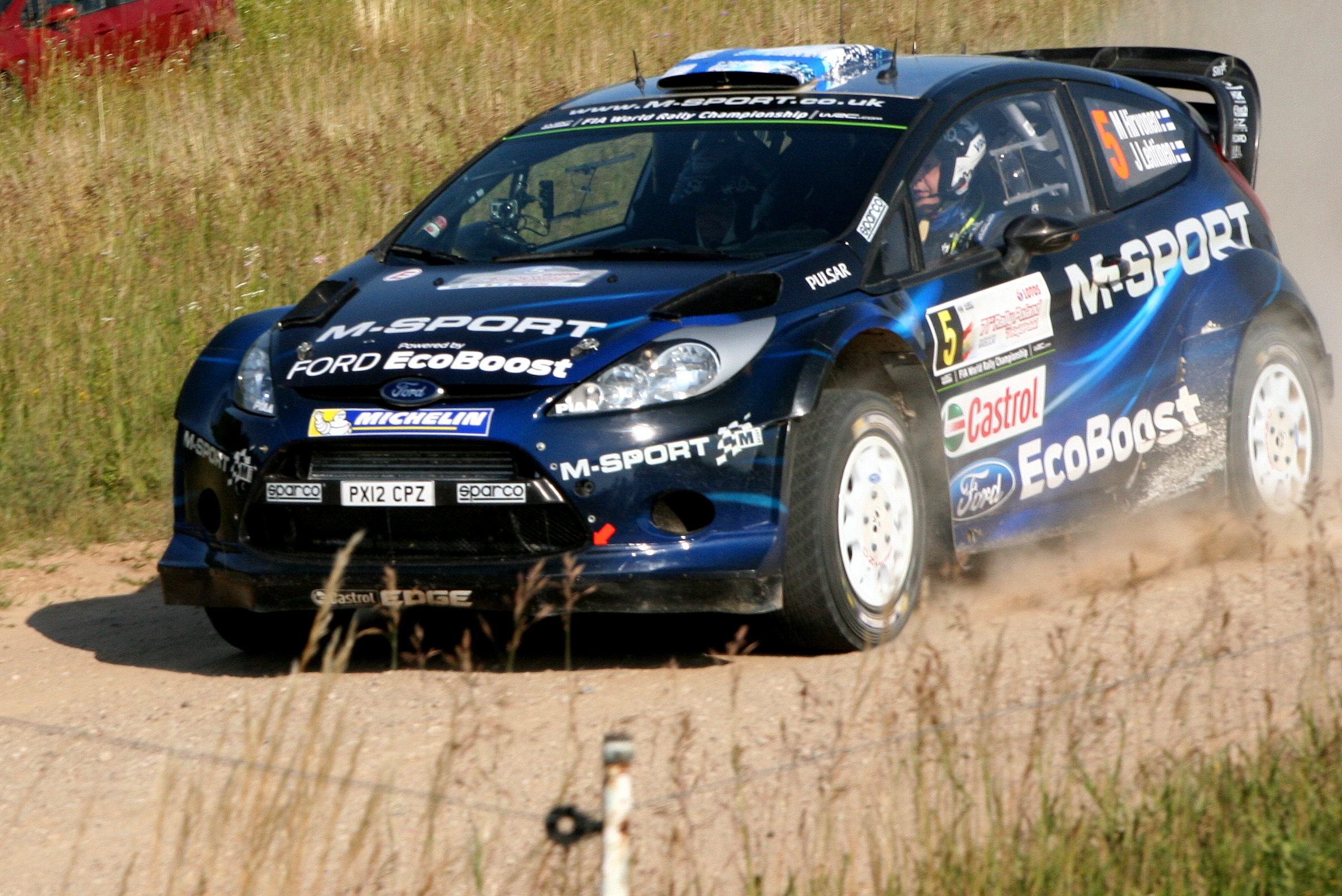 Mikko Hirvonen podczas Rajdu Polski 2014, 11 OS Chmielówka 1